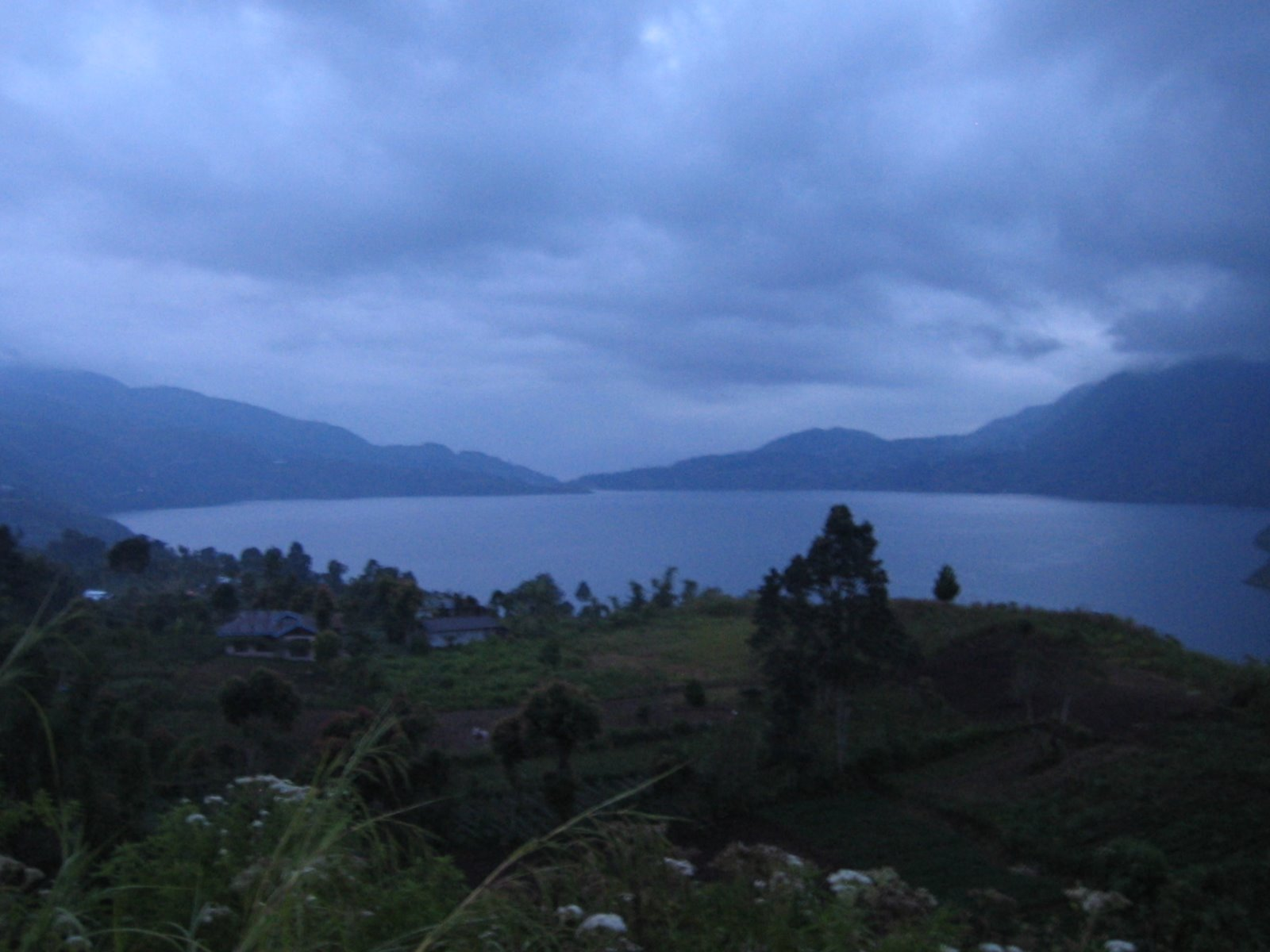 Lake Dibawah